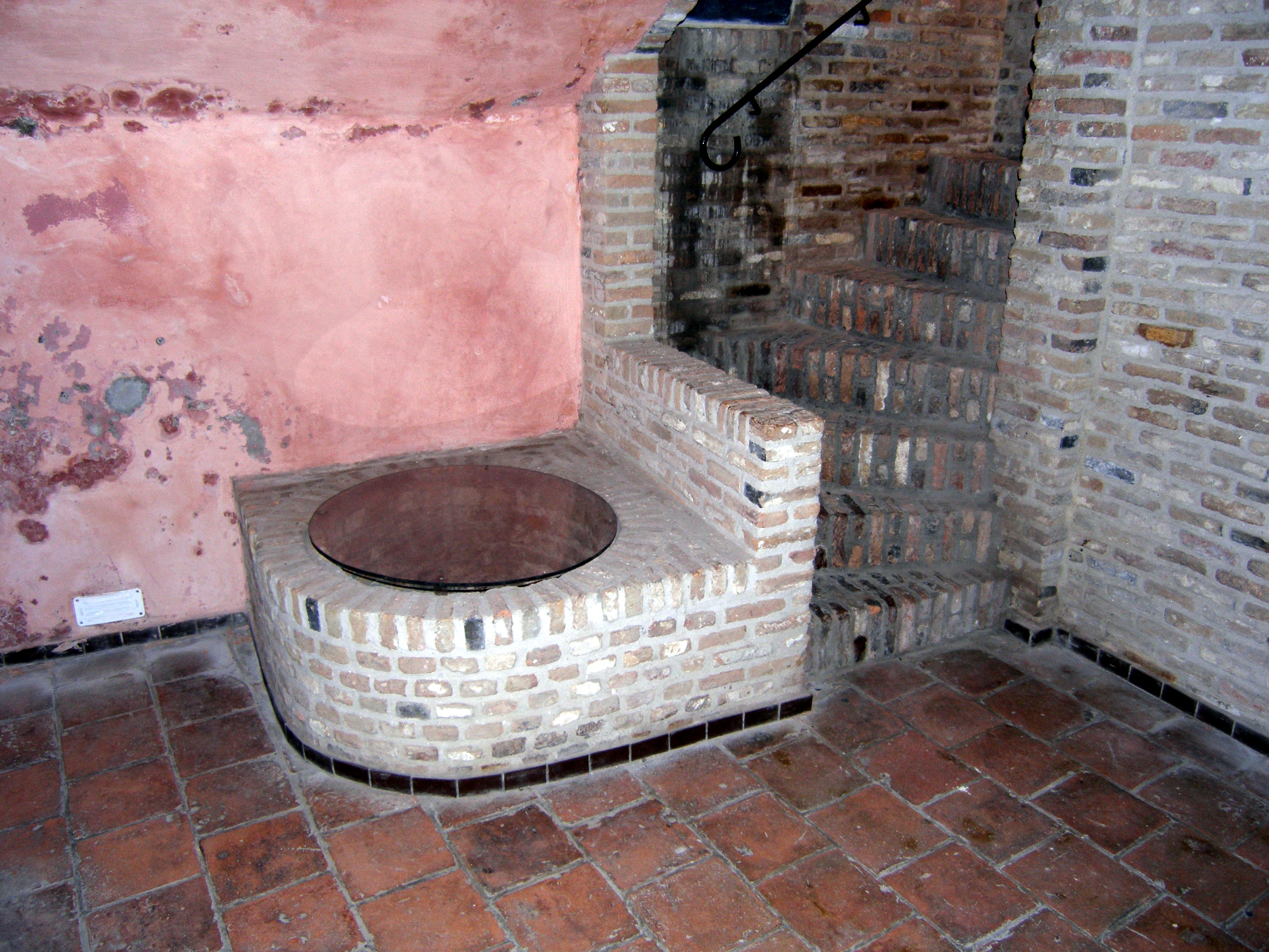 Well in synagoge at Koevoetstraat 39, Bergen op Zoom.